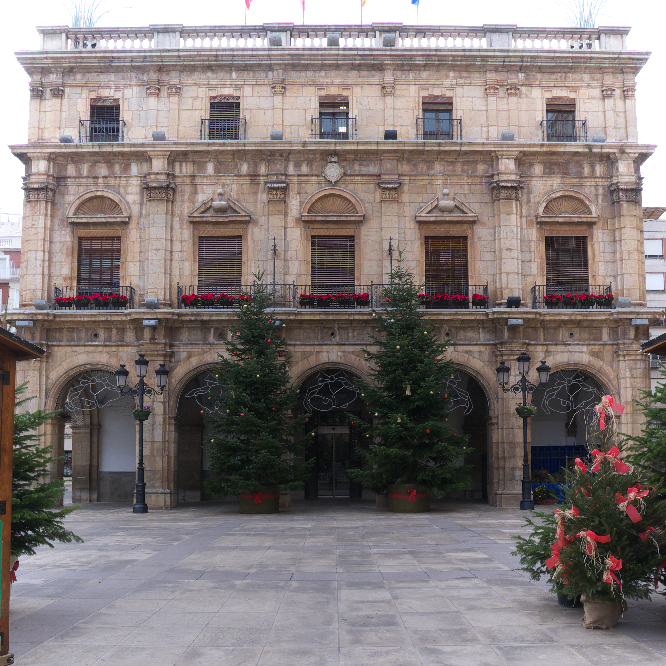 Melchor Serrano y Gil Torralba (1689-1716)